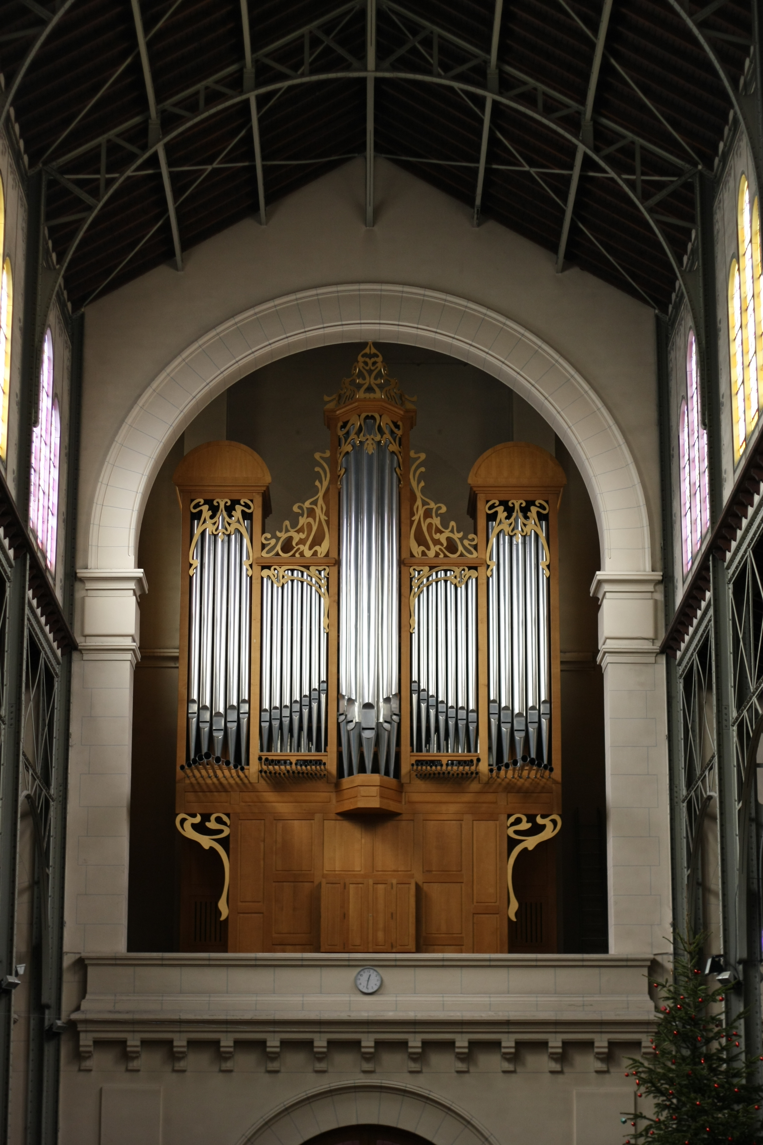 Orgel in der katholischen Pfarrkirche Notre-Dame-du-Travail in Paris (19. Arrondissement)